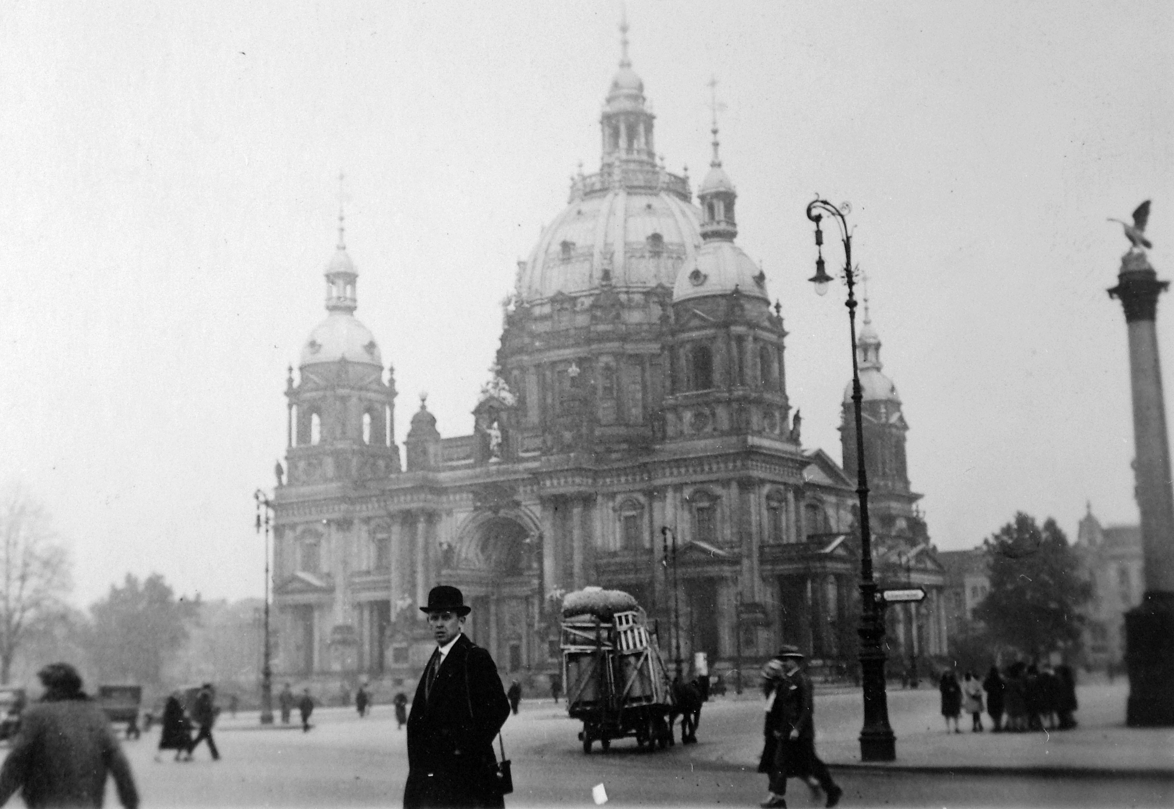 Múzeum-sziget, Berlini dóm. Location: Germany, Berlin Tags: street view, genre painting, Horse-drawn carriage, coach, lamp post, church, sculpture Title: Múzeum-sziget, Berlini dóm.